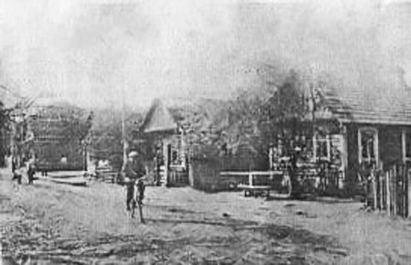 Беларуская (тарашкевіца): Любань (Lubań), вуліца Надрэчная (vulica Nadrečnaja)